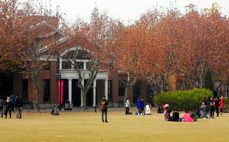 中文（中国大陆）: 华师大们前草坪